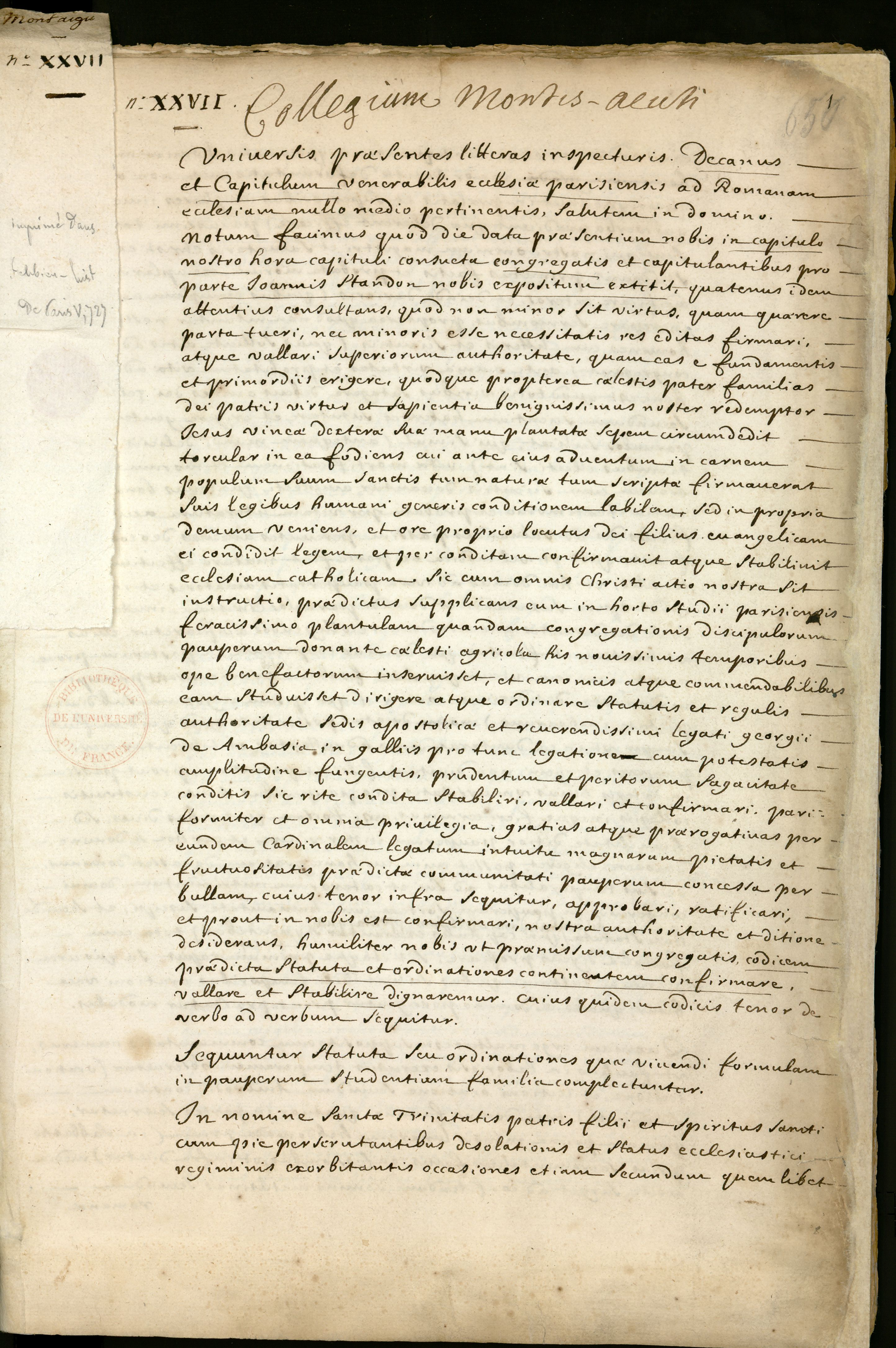 Manuscrit en latin, dans un registre de 738 feuillets consacré aux fondations et statuts des collèges.